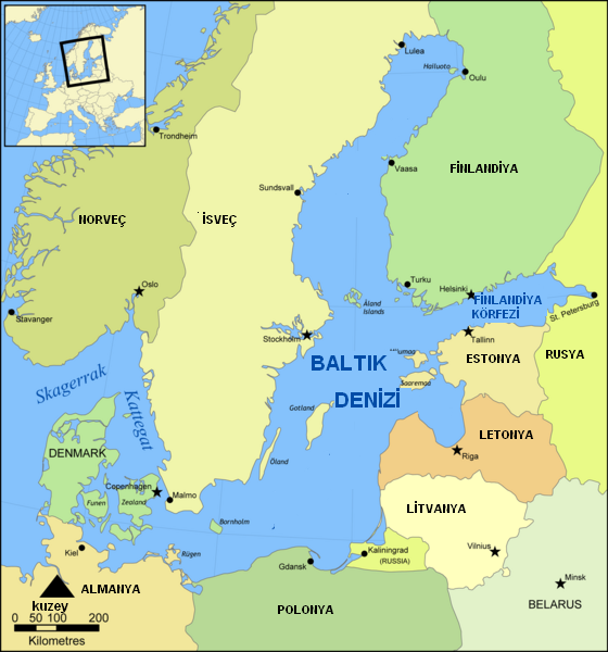 Haritayı Türkçeleştirdim.